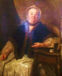 Anna Marie Sophie Gräfin von Ellrodt (+ 1787), Ehefrau des Philipp Andreas Graf von Ellrodt, Premierministers des Markgrafentums Bayreuth (* 4. August 1707, + 1. Januar 1767)